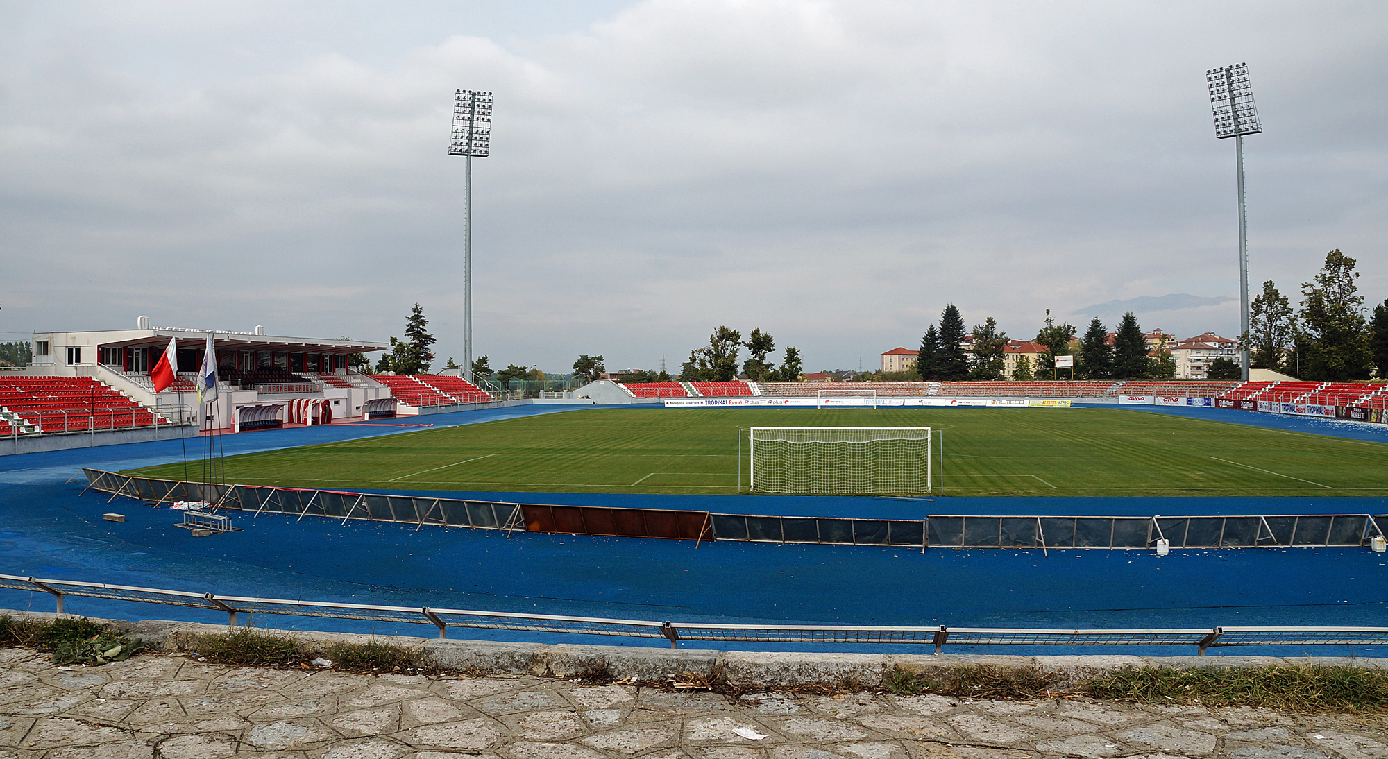 Stadiumi Skënderbeu në Korçë